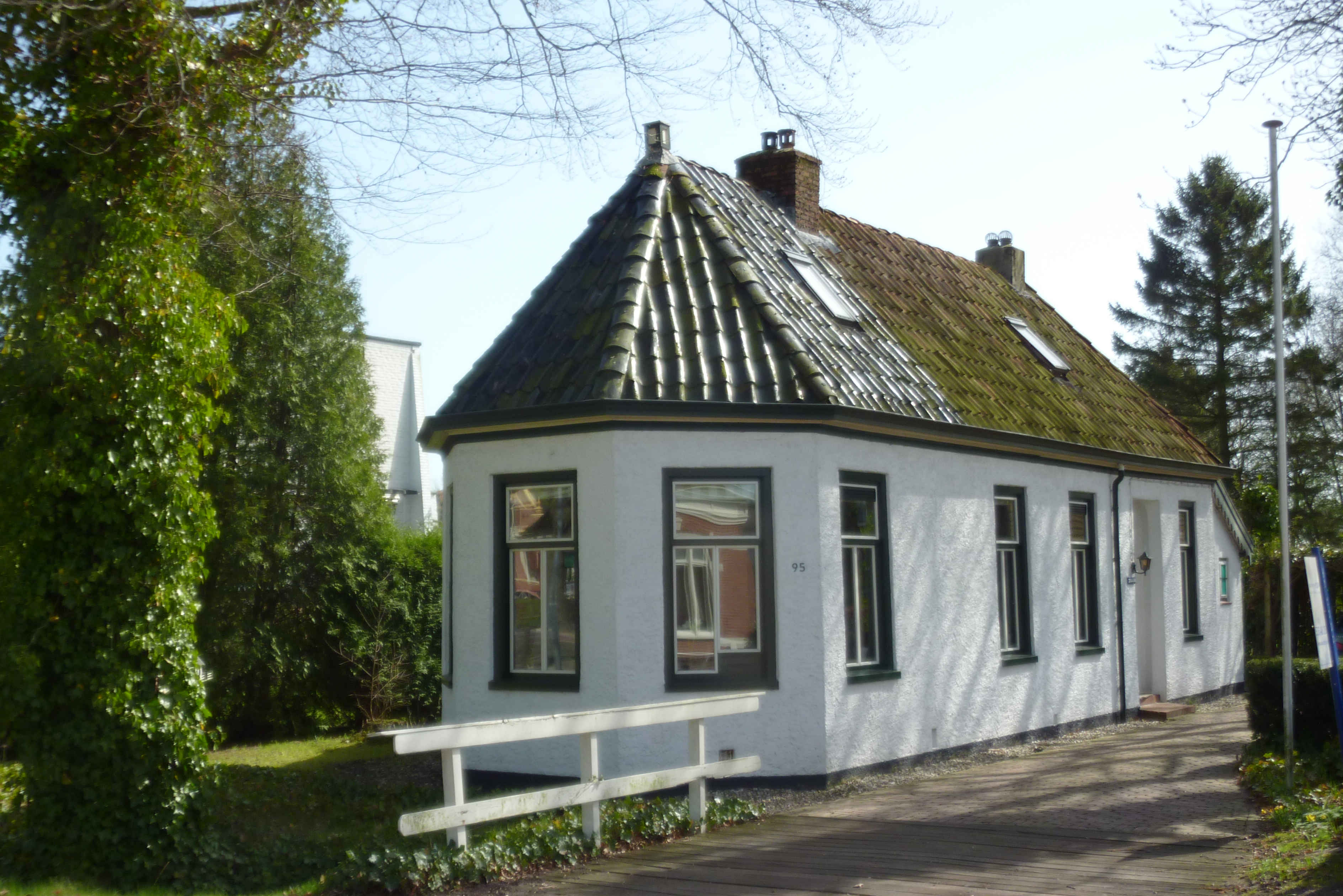 Schildwolde: Tol of portierswoning, Hoofdweg 95 53″ N, 6° 48′ 51.12″ E